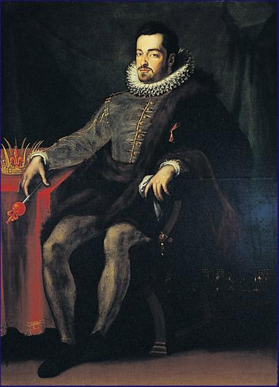 Ferdinandi_i_de'_medici